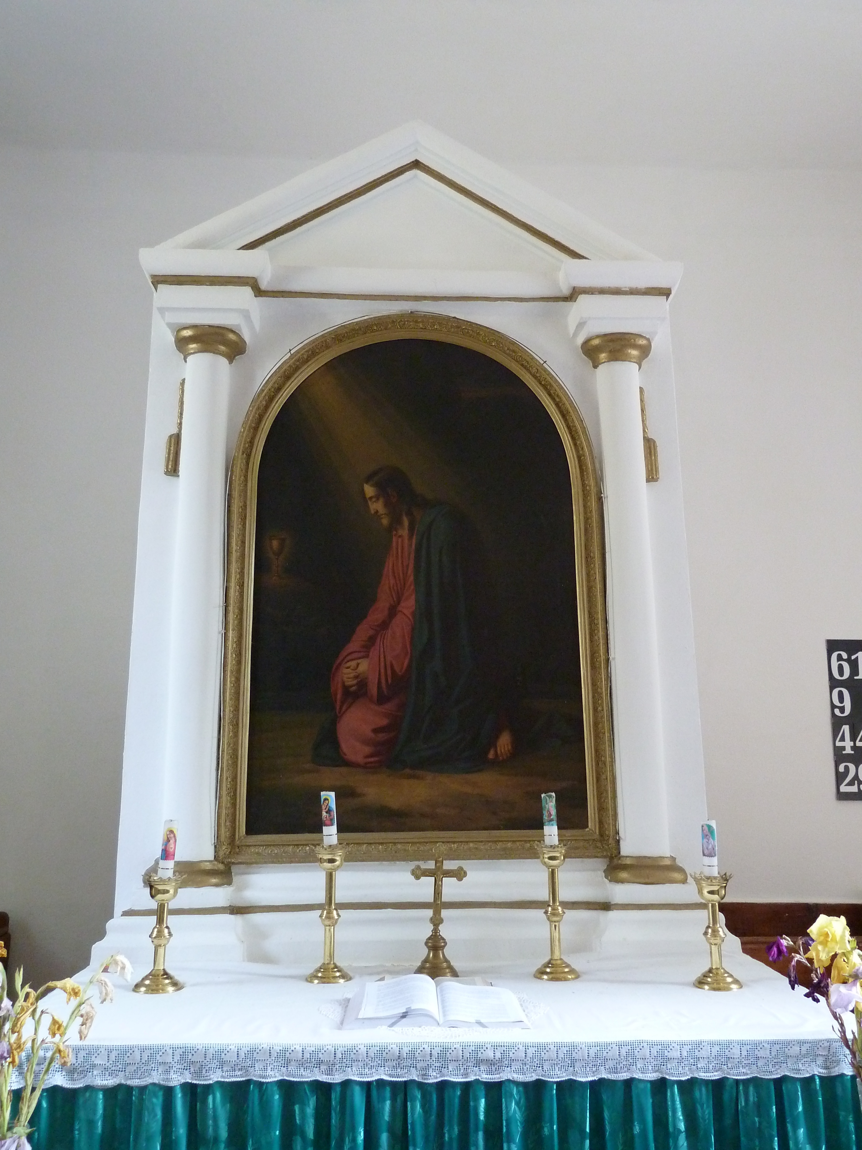 Bokor, evangélikus templom. A templom oltára. This is a photo of a monument in Hungary, Identifier: 6542